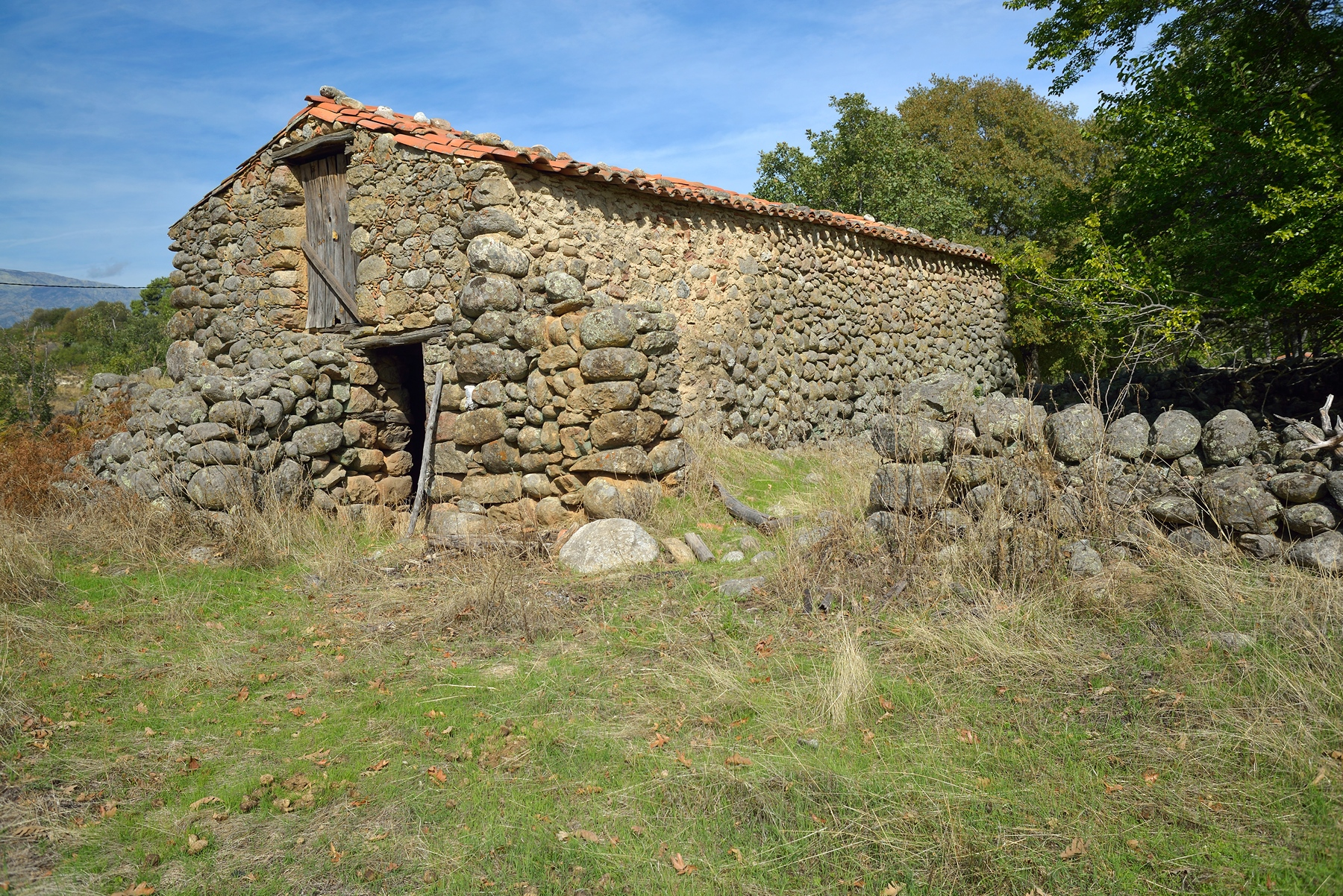 Los sequeros son construcciones que podemos encontrar exclusivamente en Candeleda destinados a secar con humo los pimientos.